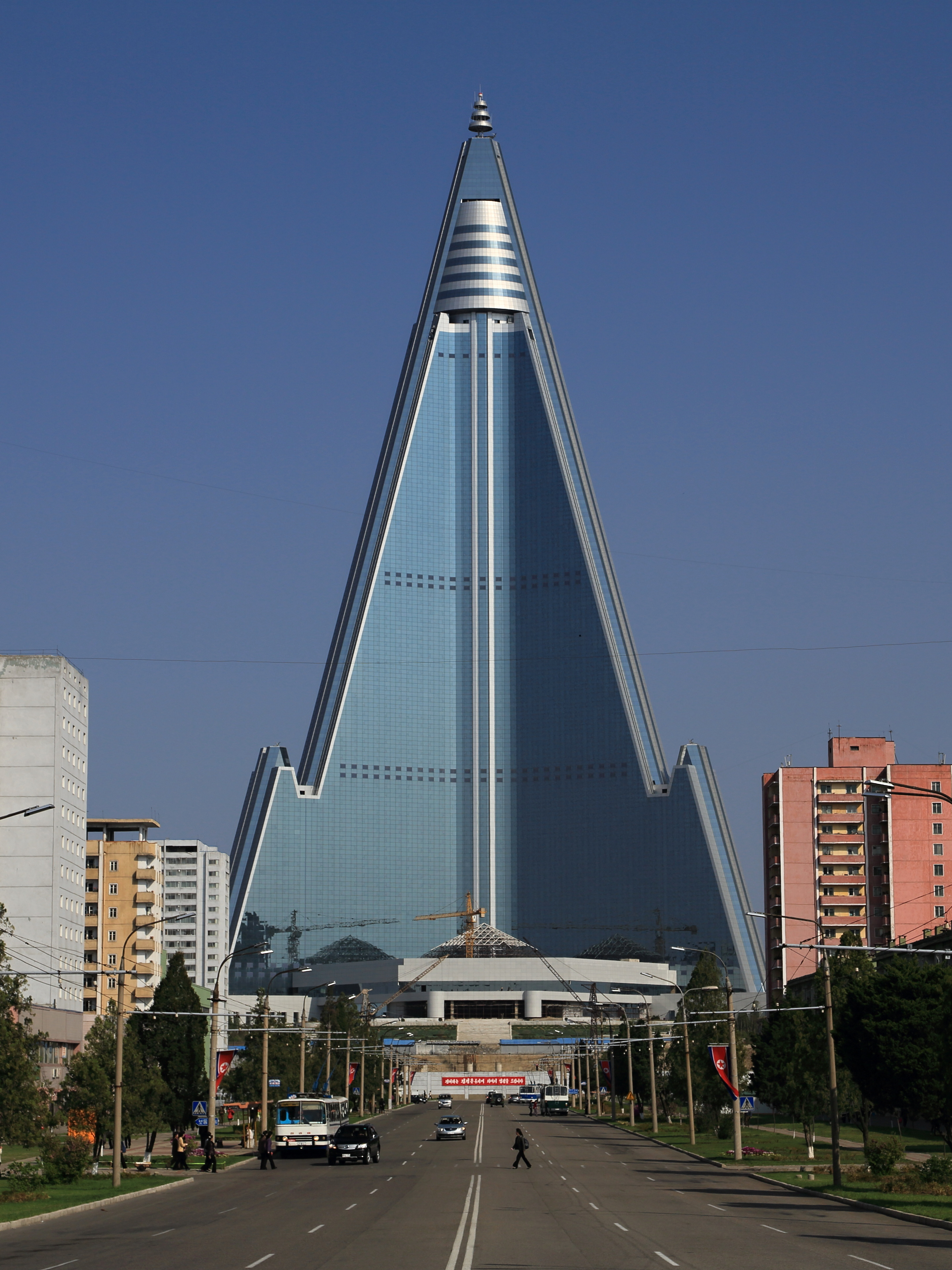 Prázdné slnice a rozestavěný hotel Ryugyong